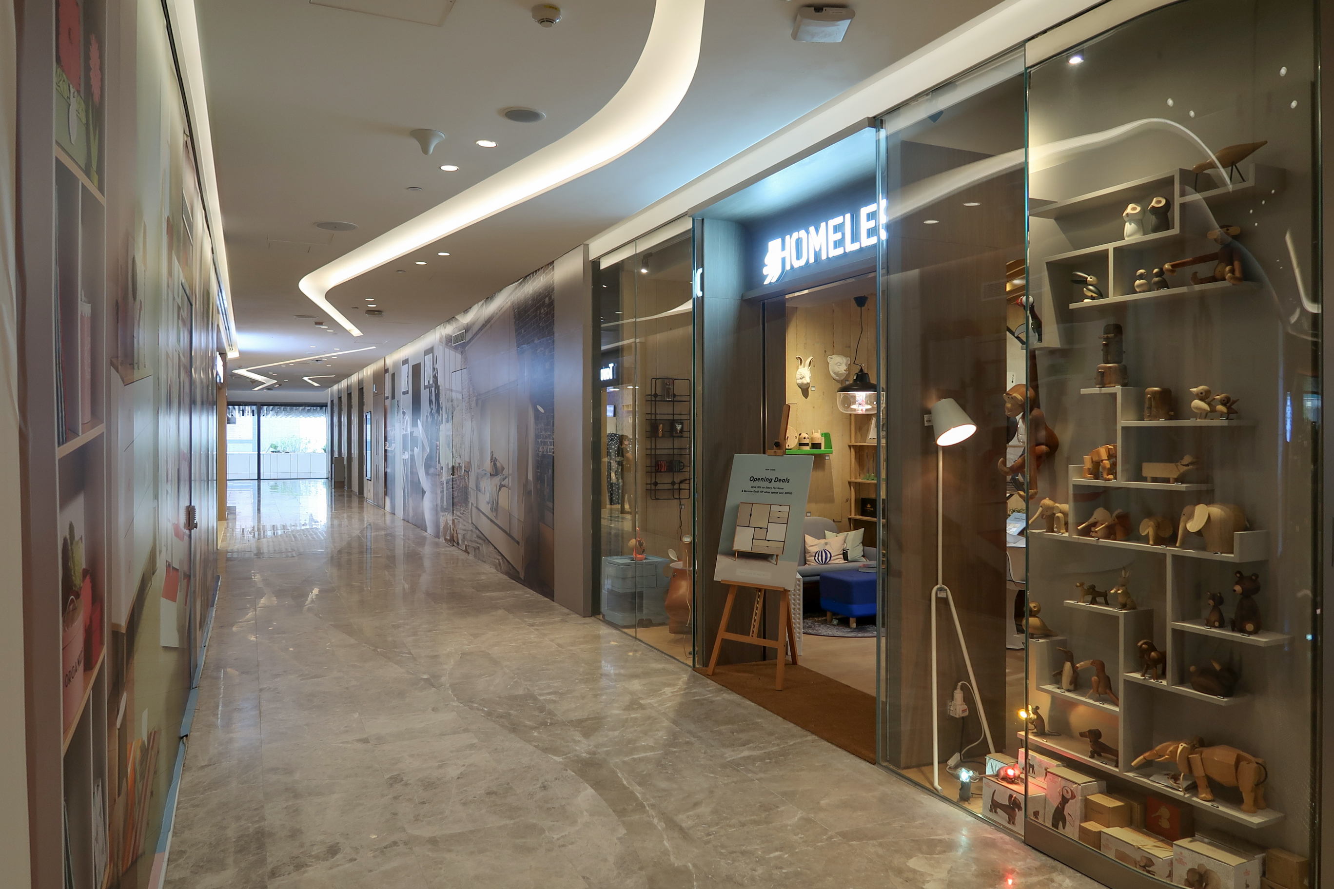 Lee Garden Three Level 1